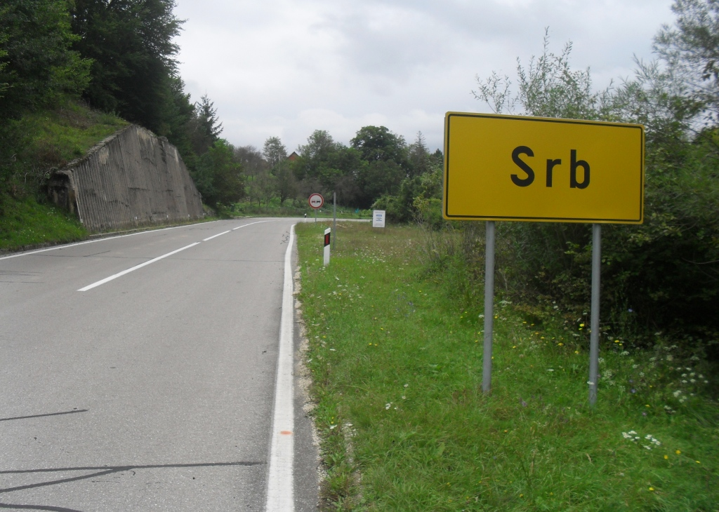 Табла на улазу у Срб из правца Грачаца, Лика